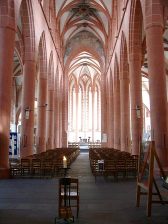 Foto der Heiliggeist Kirche in Heidelberg (Innenansicht).